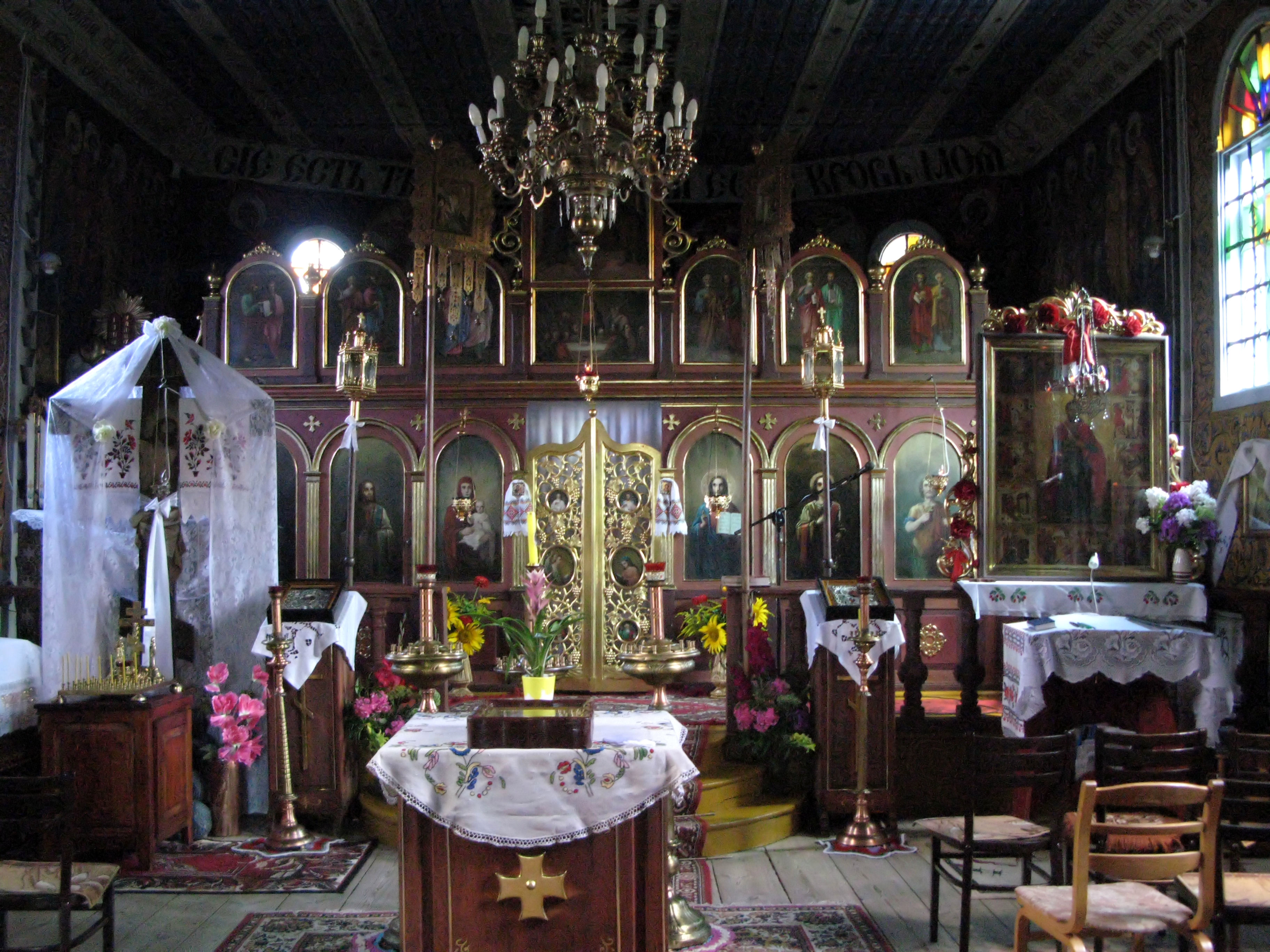 Cerkiew unicka, ob. kościół rzym.-kat. par. p.w. św. Nicefora (drewn., XVIIXVIII, 1852) Kostomłoty